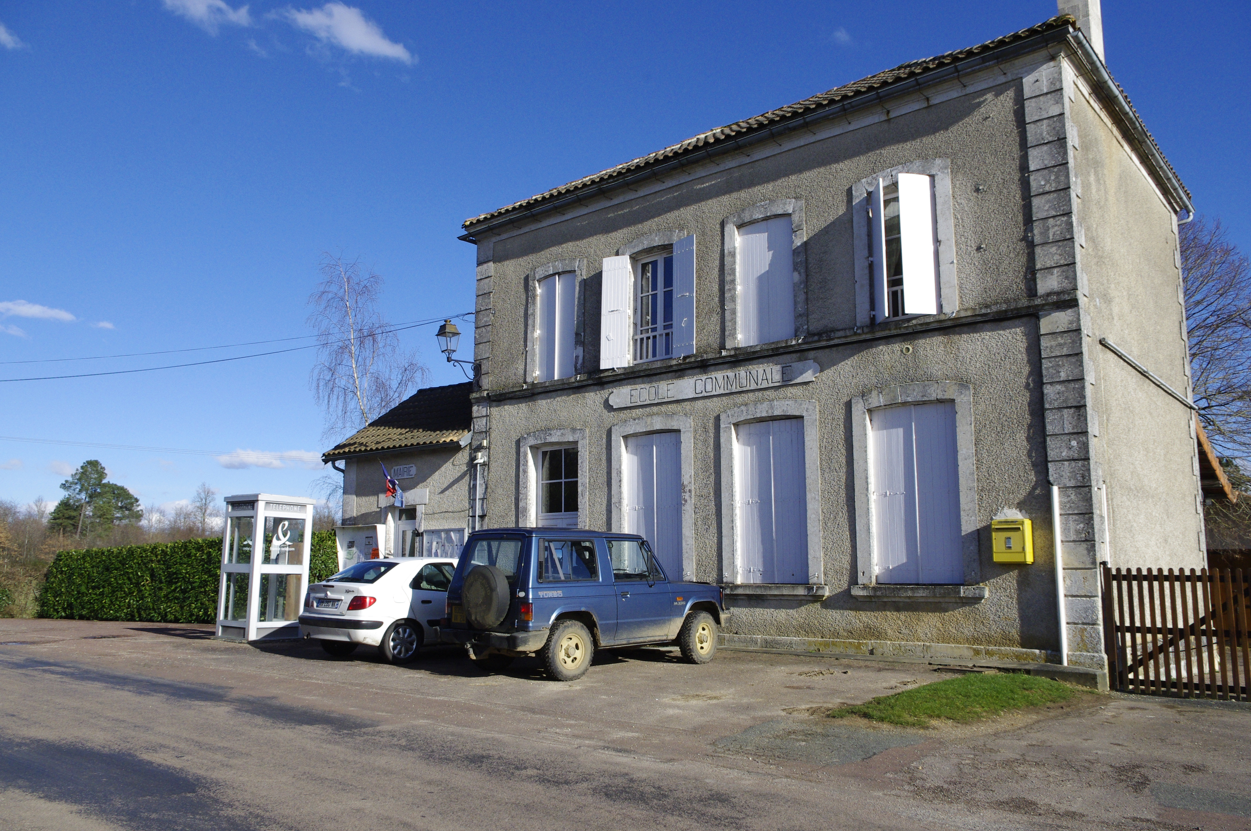 La mairie et l'ancienne école de la commune de Connezac à Maine-Rousset, Dordogne, France.